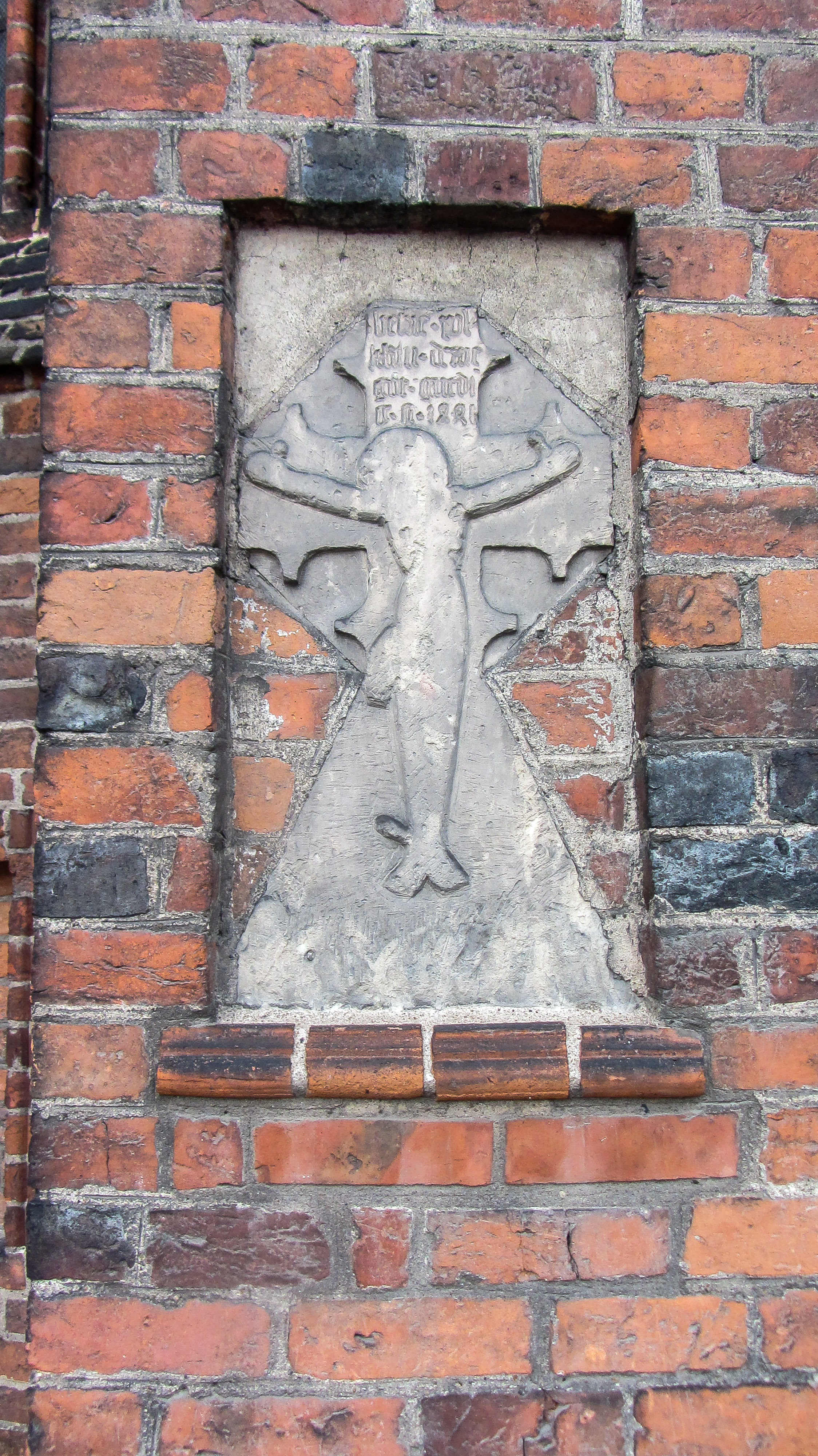 Steinkreuz V eingemauert in die südlichen Chorstrebepfeiler der Katharinenkirche in Stendal